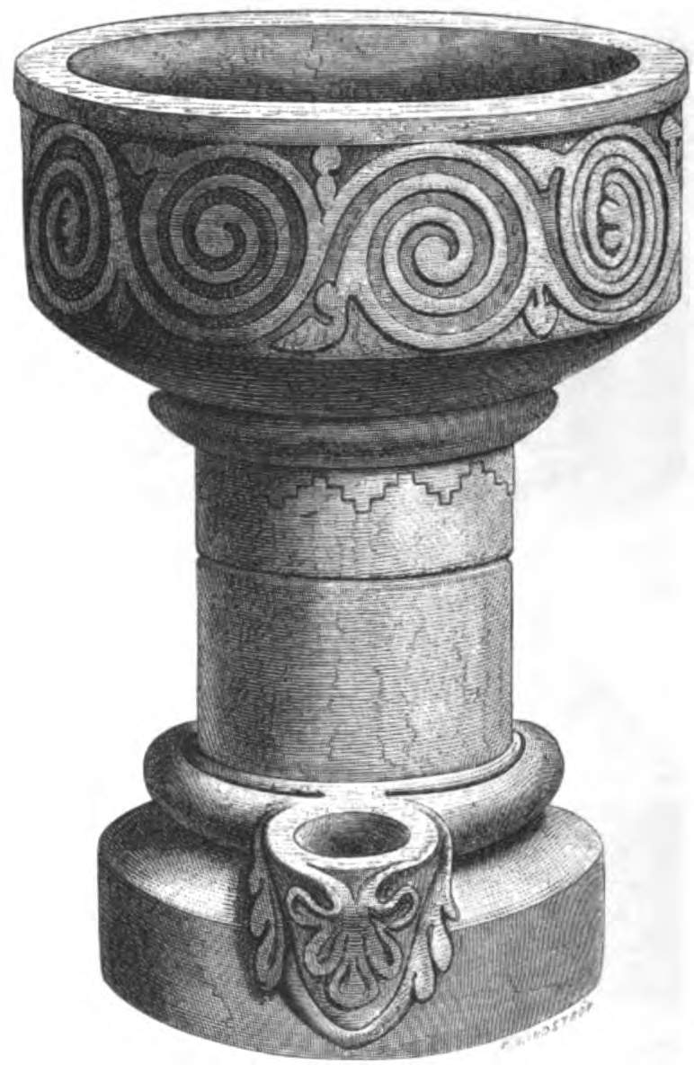 Säve kyrka. Dopfunt